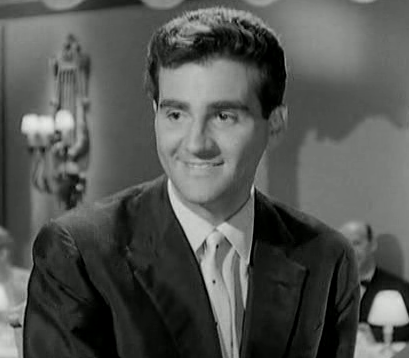 screenshot da Totò (1957) catturato personalmente